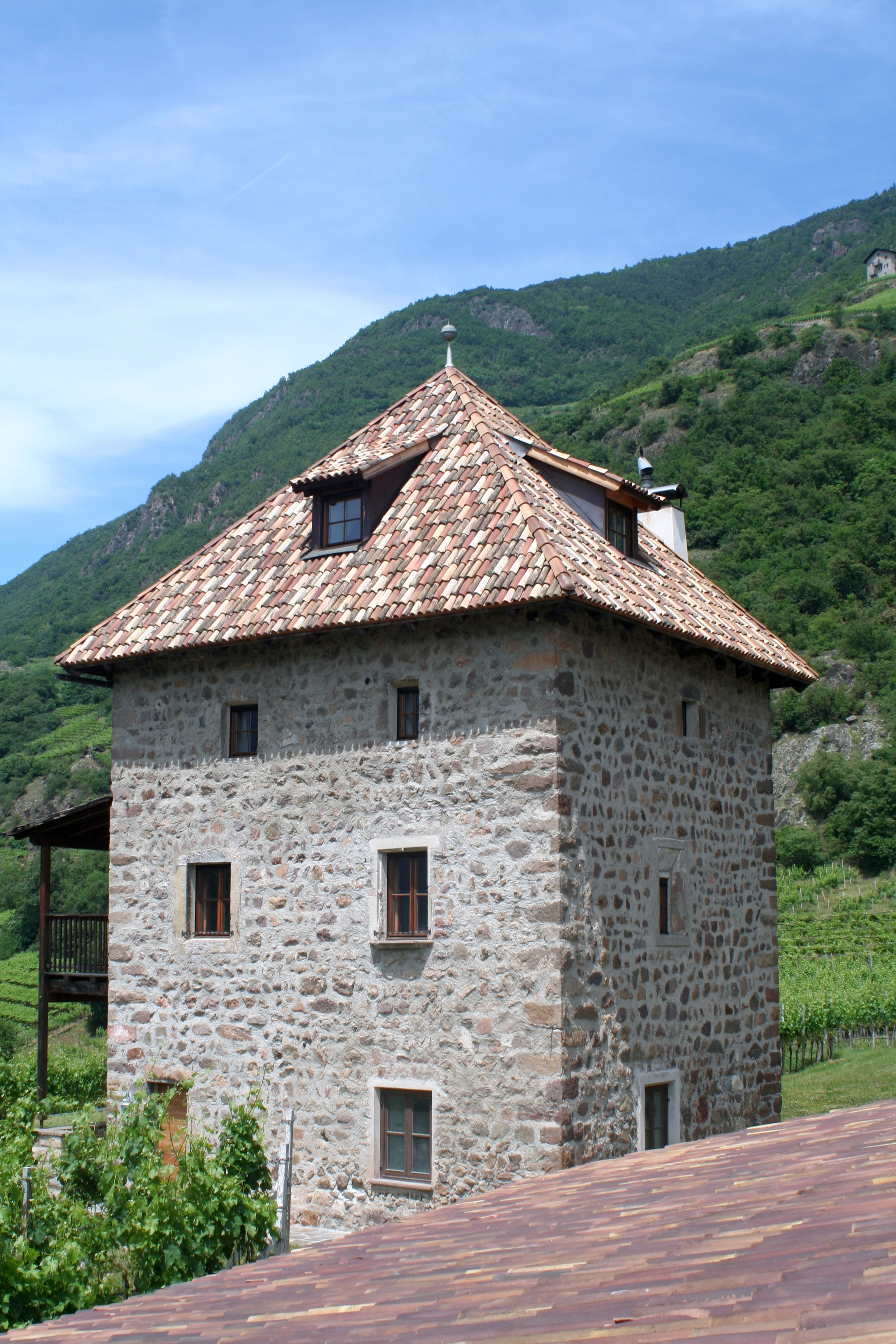 Turm zu Kreut in Terlan (Südtirol)